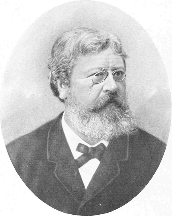 Porträt von Paul Adolphe Tièche